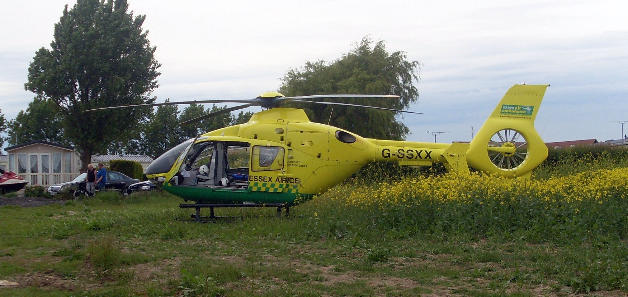 Air ambulance